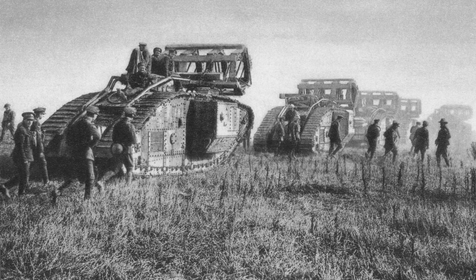 British Mark V Tanks with crib fascines carried to help them cross the Hindenburg line, pictured at Bellicourt, September 29th, 1918.